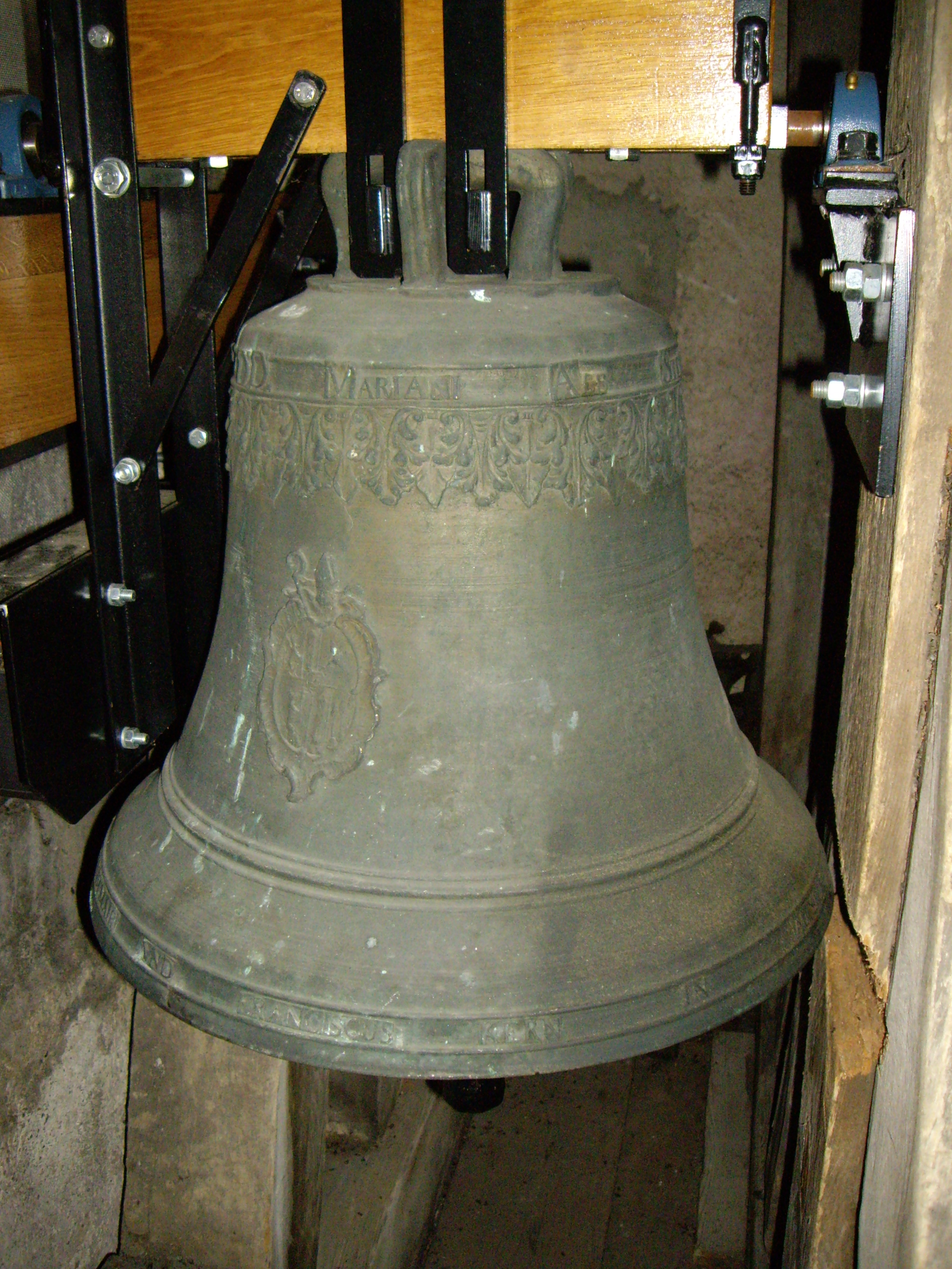 Sterbeglocke (Glocke 7) der Wieskirche in Steingaden.